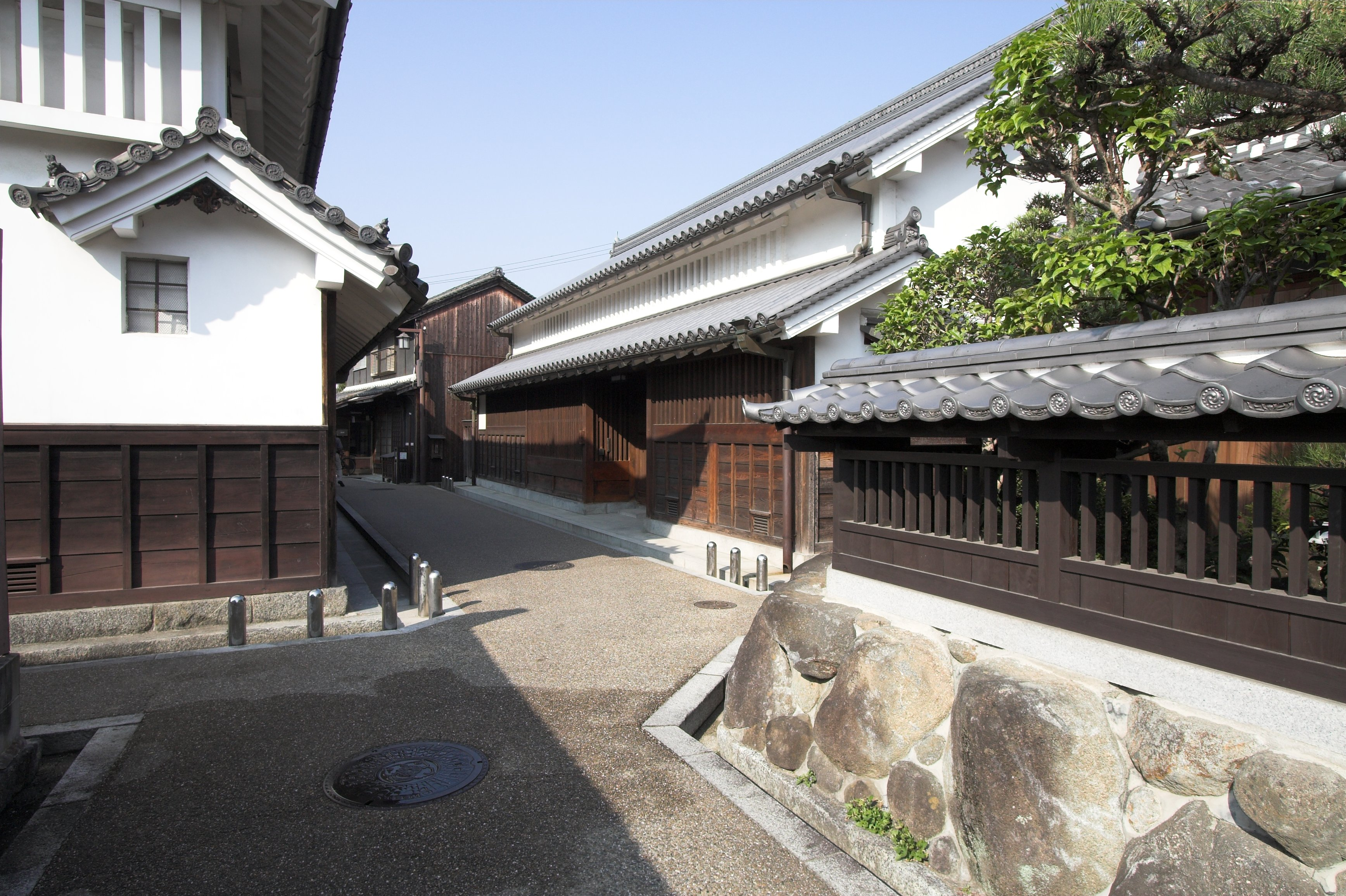 重要伝統的建造物群保存地区・今井町(奈良県橿原市, Japan)